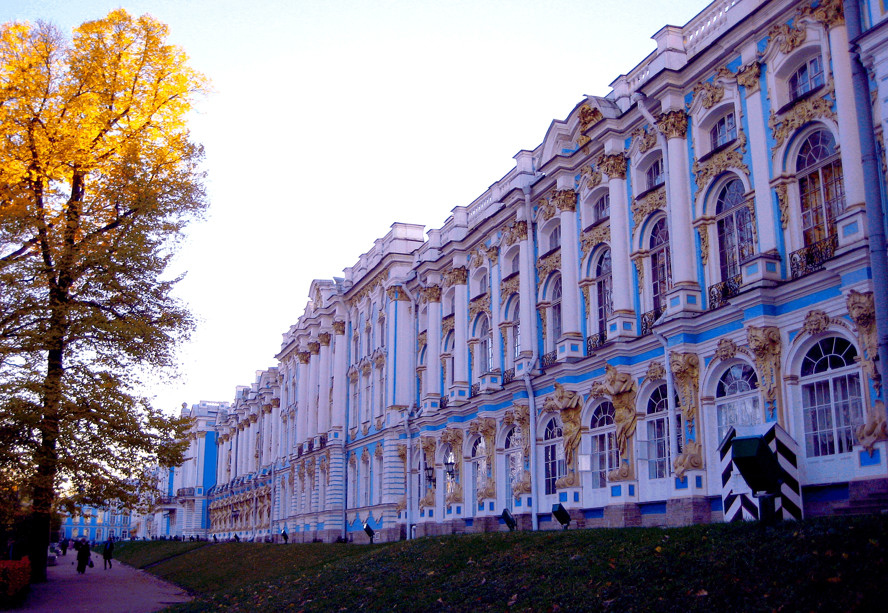 Екатерининский дворец: Садовая улица, 7, Пушкин, Пушкинский район, Санкт-Петербург